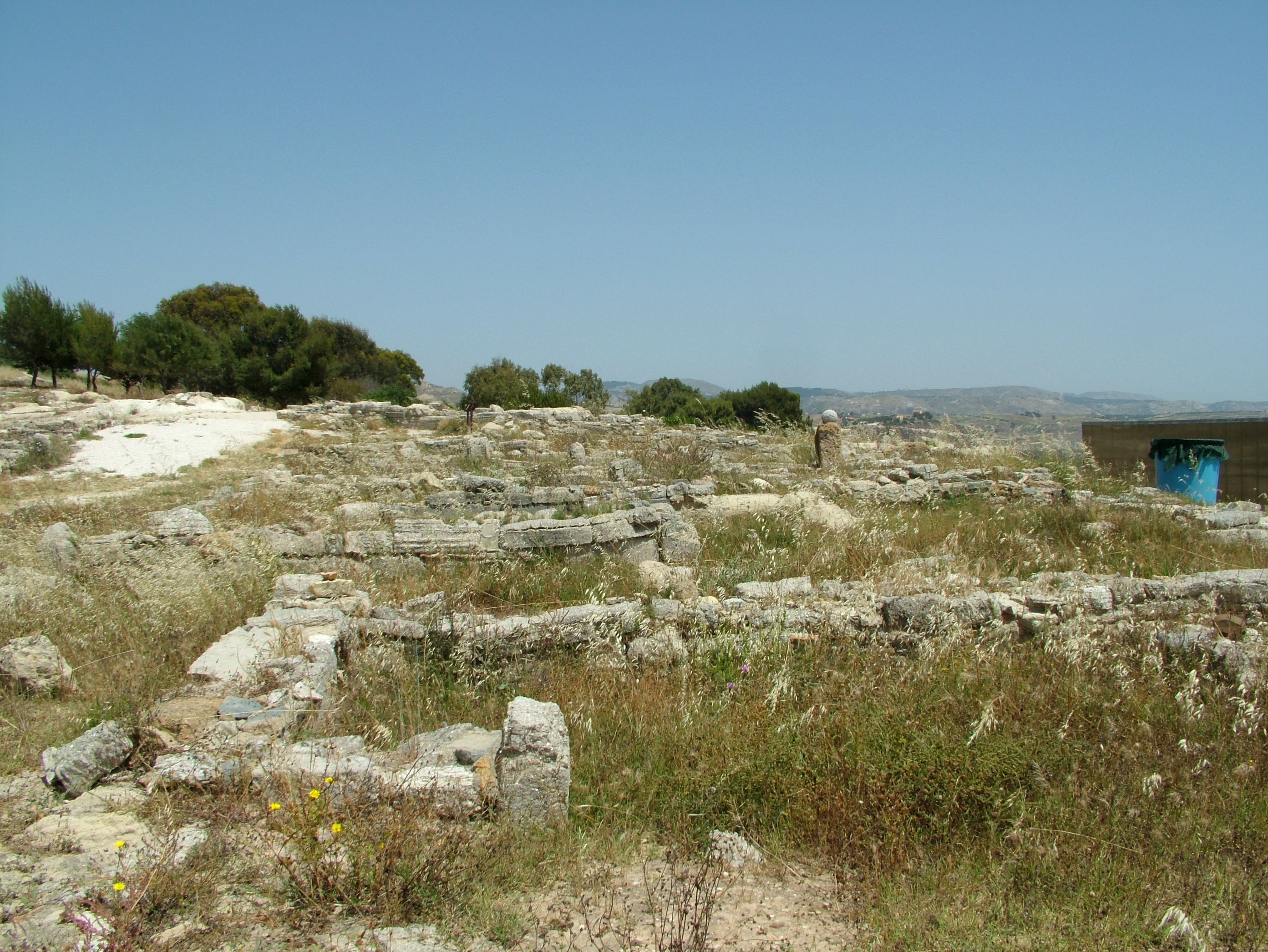 Heraclea Minoa Sizilien, ein ausgebrabenes Haus